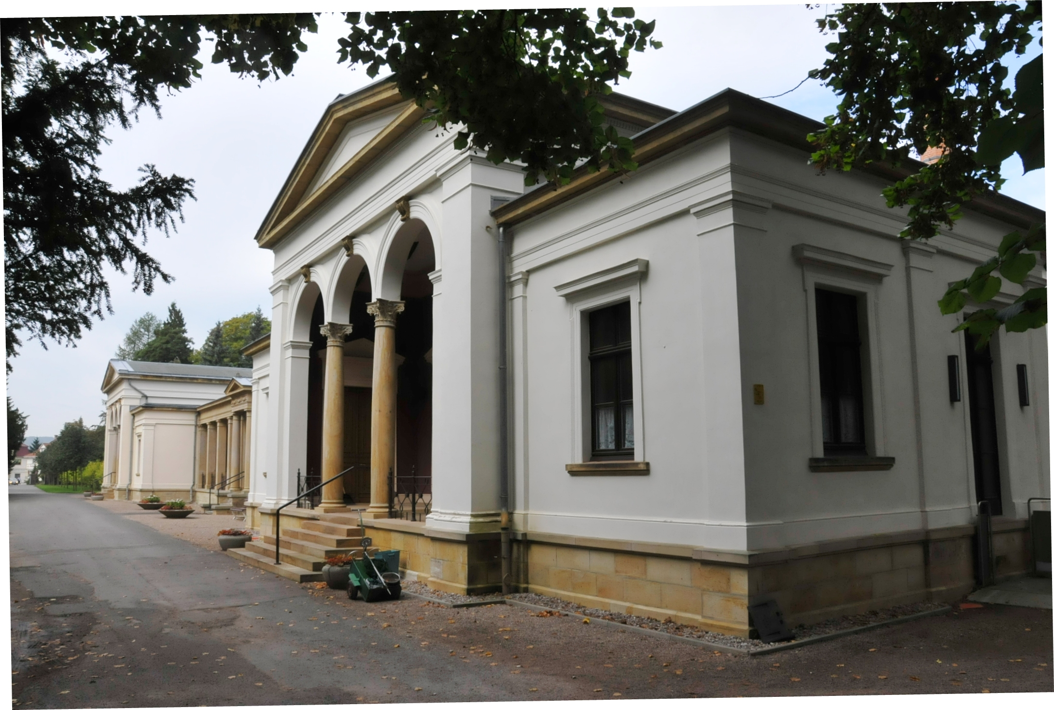 Kolumbarium in Gotha